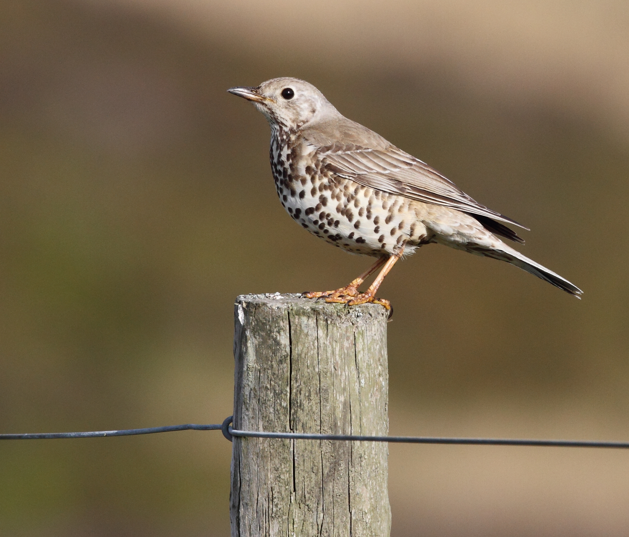 brych y coed, ardal y Brenig